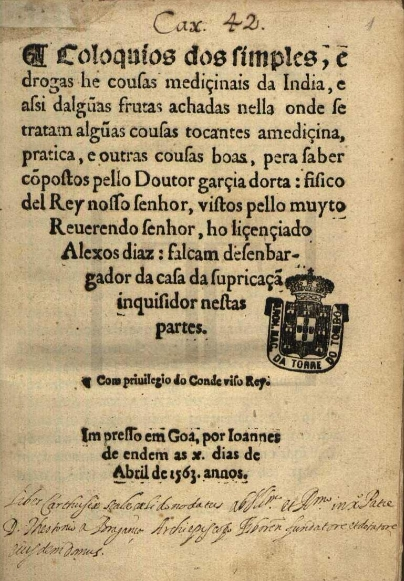 Title page of Colóquio dos Simples de Garcia de Orta. Goa, 1563.